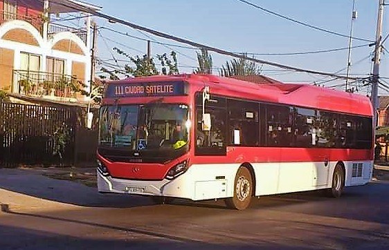 Bus Transantiago Mondego II